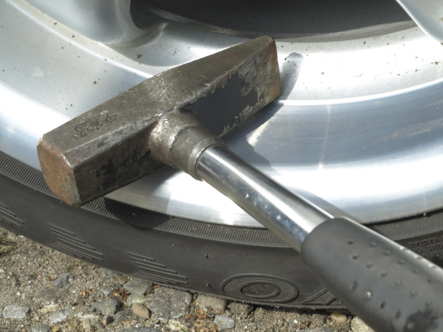 Schlosserhammer, deutsche Form mit Stahlrohrstiel und Kunststoffgriff